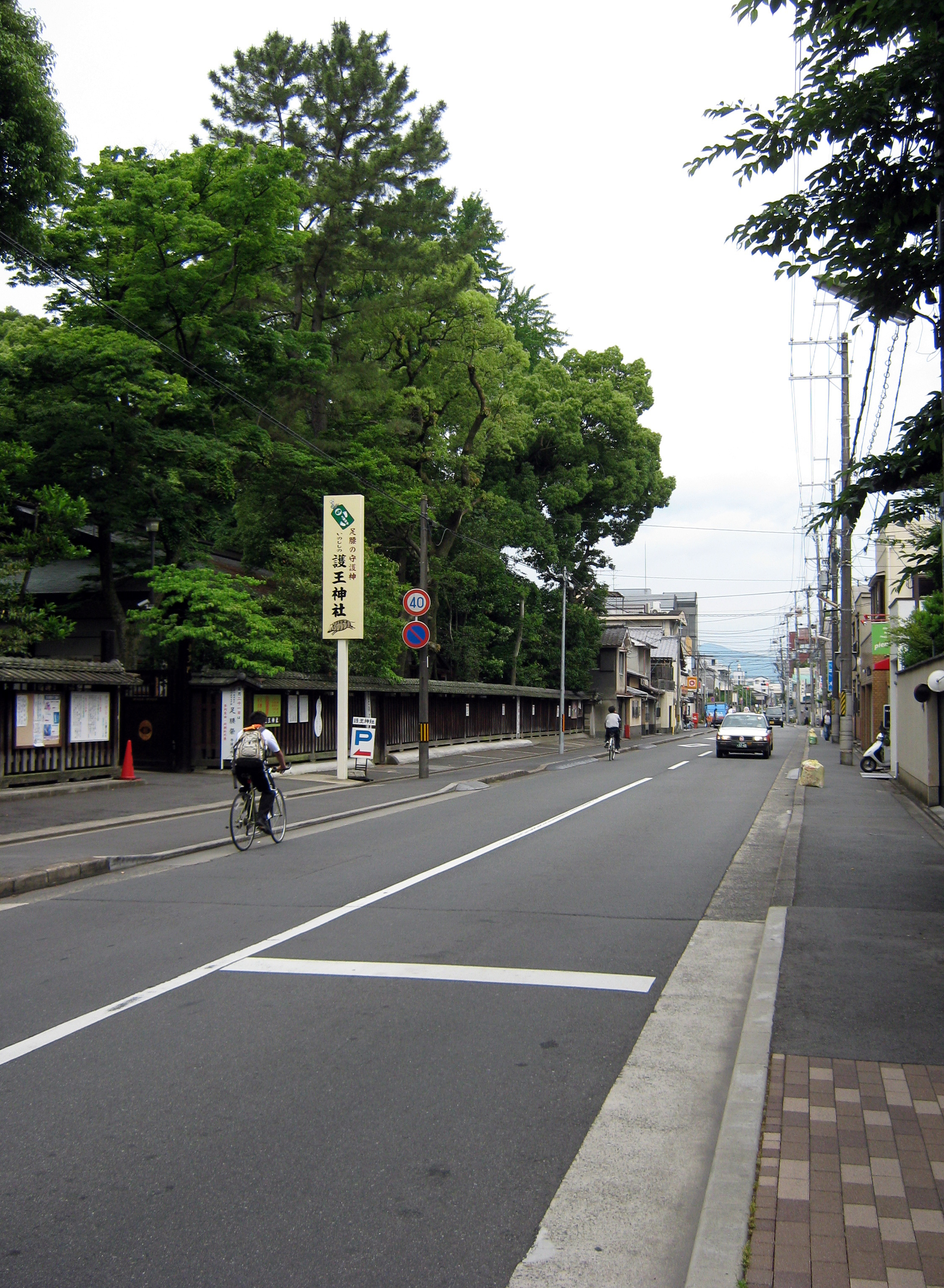 下長者通